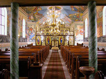 A balkányi Urunk színeváltozása görög katolikus templom belseje